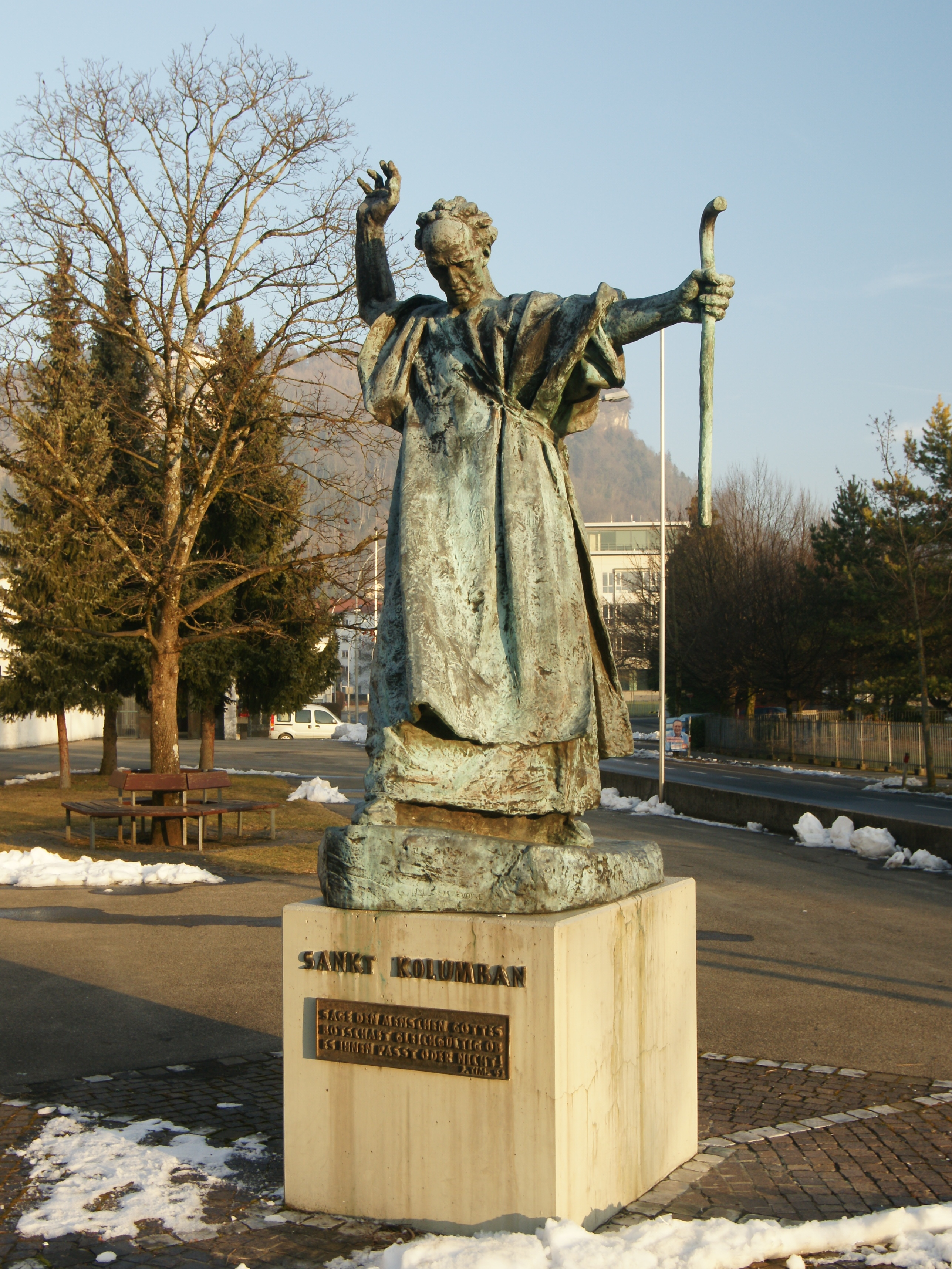 Kolumbankirche in Bregenz.